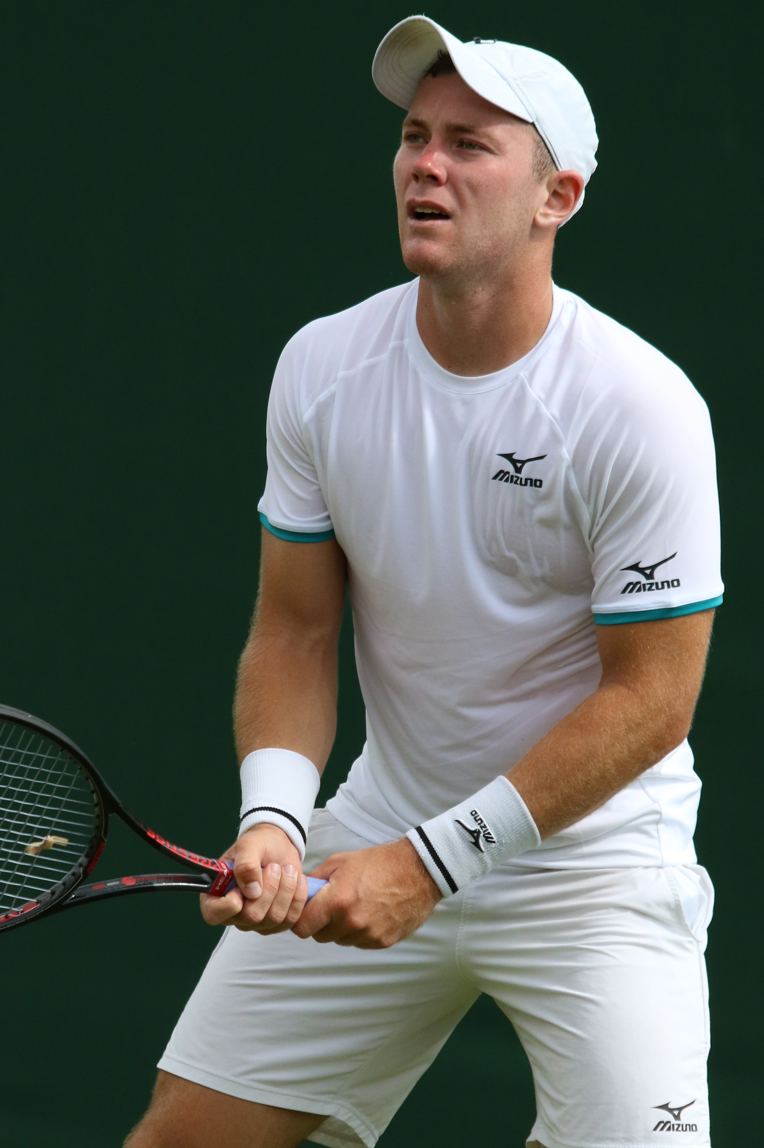 Koepfer WM19 (41)